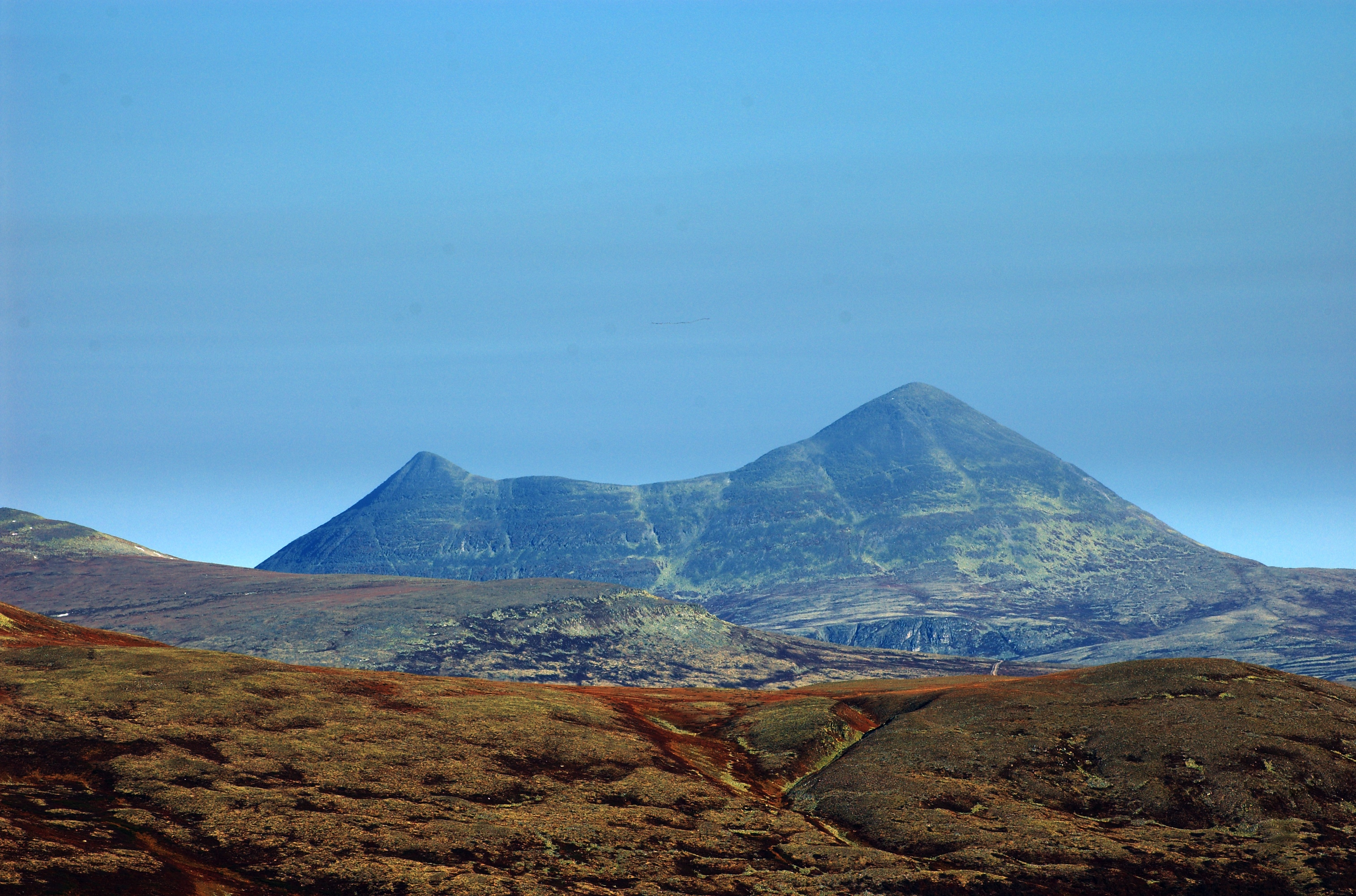 Storsølnkletten 1827 seen from southwest, 25 km distance